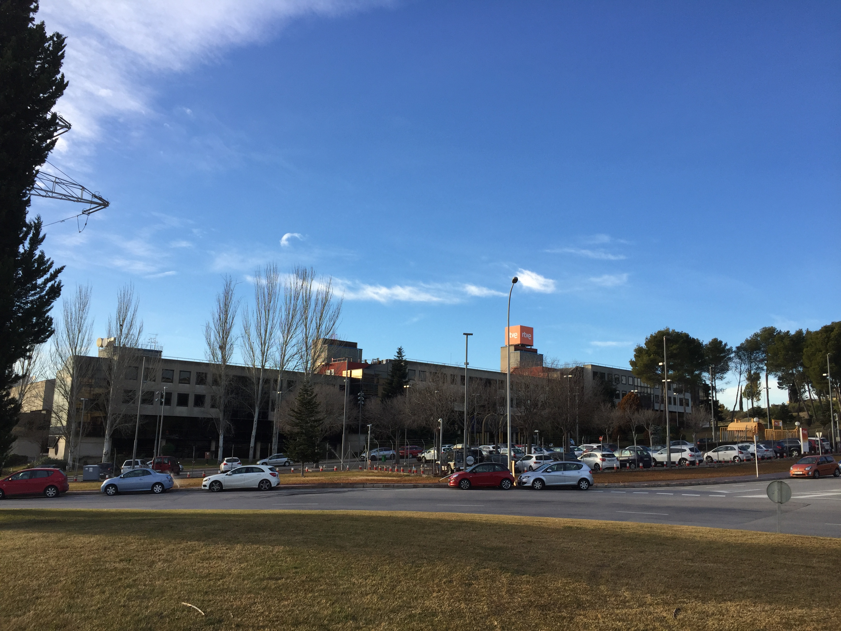 Rtve Sant Cugat